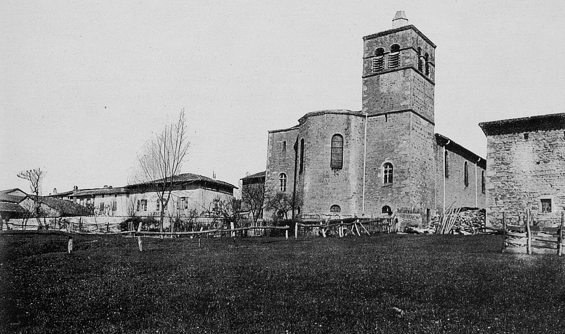 Dictionnaire illustré des communes du département du Rhône. Tome 1 / par MM. E. de Rolland et D. Clouzet.